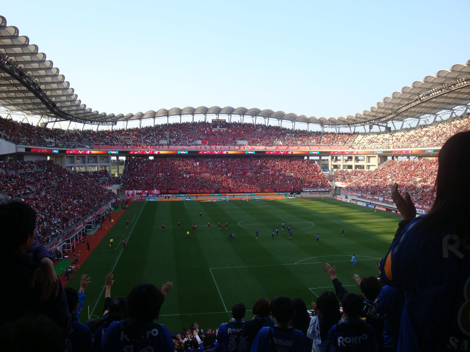 20100501_Kashima Antlers vs Gamba Osaka @Kashima soccer Stadium_007